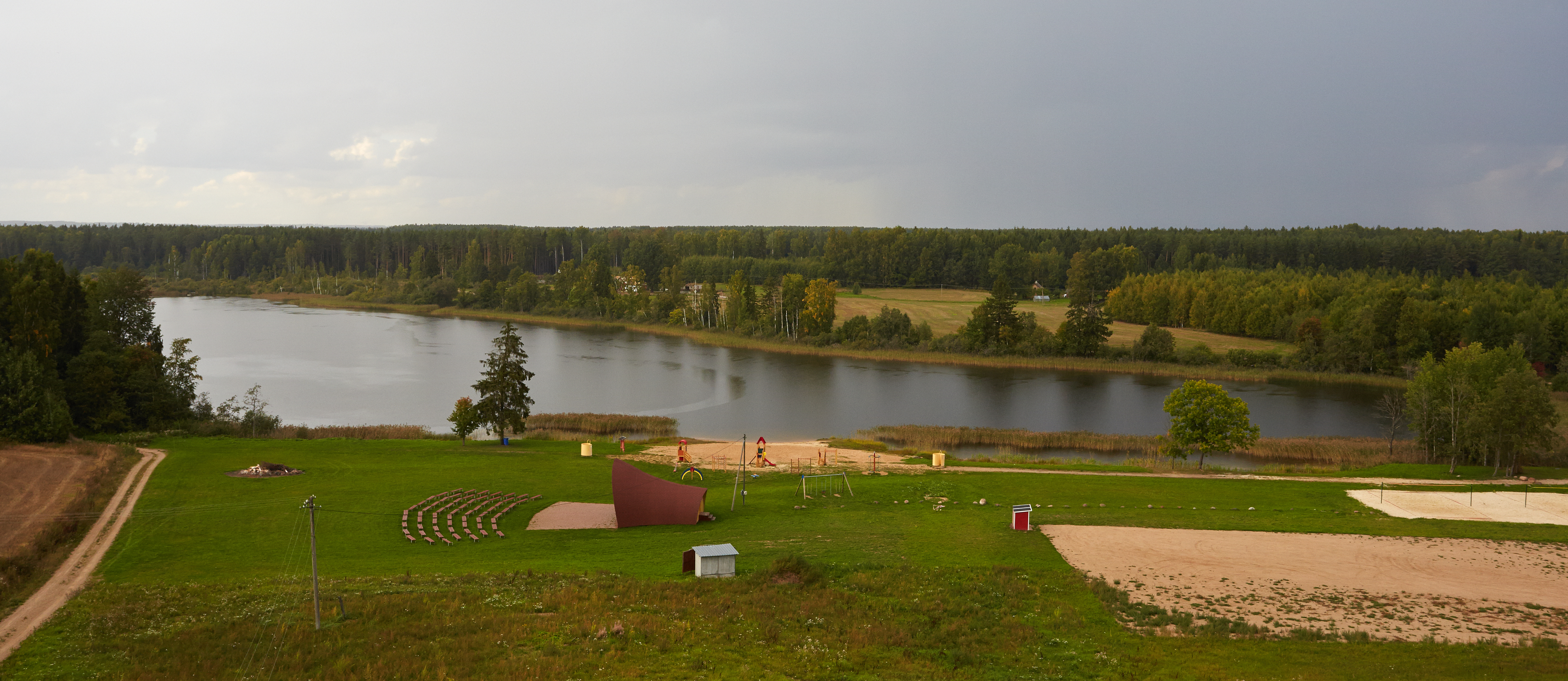 Tilsi Kõrbjärv nähtuna Kõrbjärve vaatetornist 2013. aasta augustis